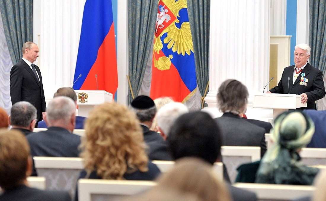 Орденом Дружбы награждён художественный руководитель Государственного театра пародий Владимир Винокур